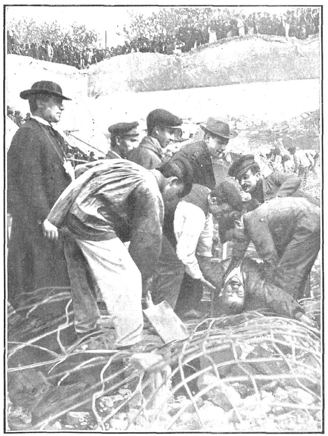 Grupo de obreros en el momento de sacar de entre los escombros el cadáver de una de las víctimas. (FOT. NUEVO MUNDO POR GOÑI).